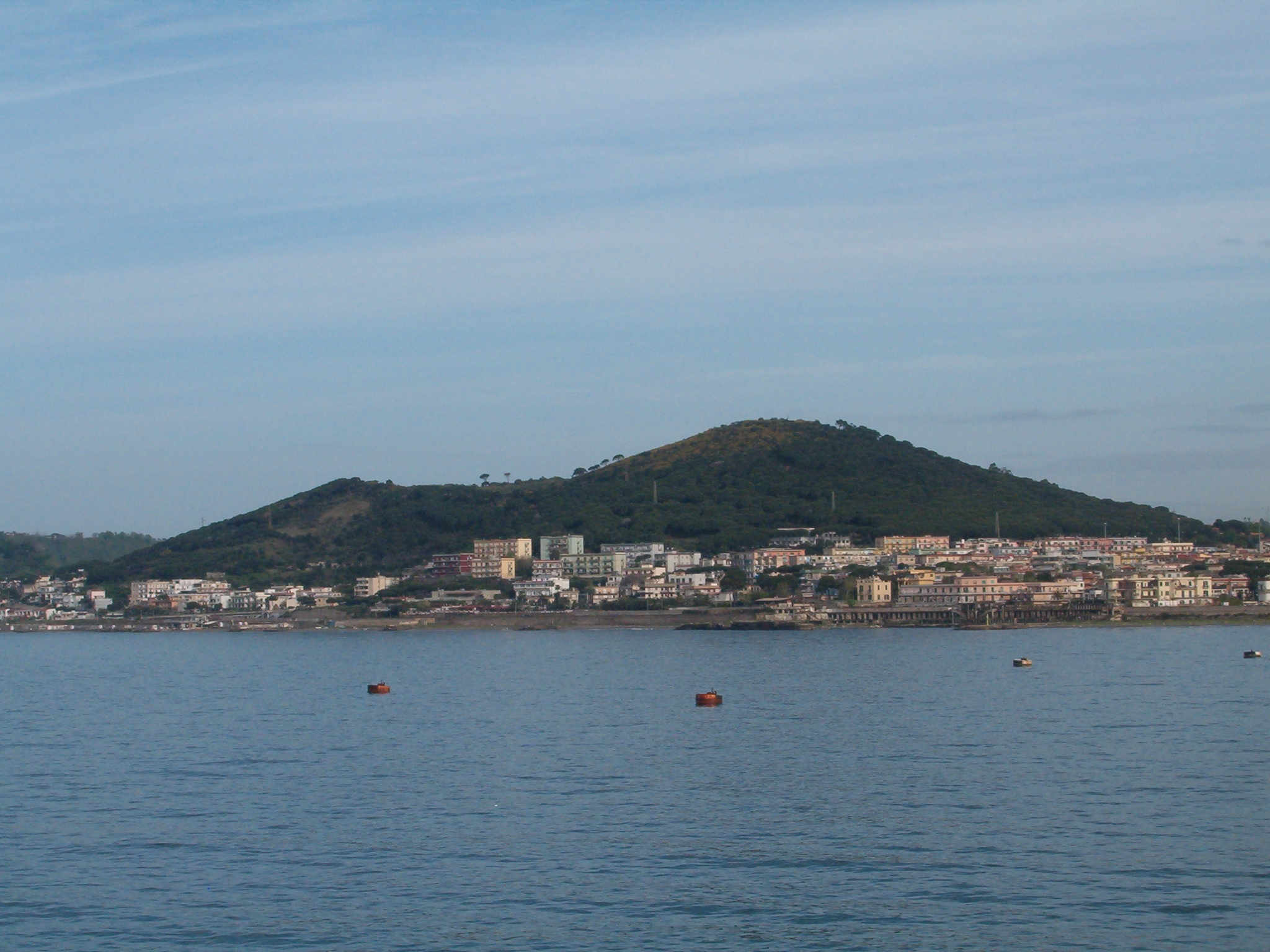 Campi Flegrei: veduta del vulcano Monte Nuovo dal Golfo di Pozzuoli: il Monte Nuovo è caratterizzato dalla pineta e dalle ginestre (in fiore nel mese di aprile). Ai suoi piedi vi è l'abitato di Arco Felice, frazione del comune di Pozzuoli.